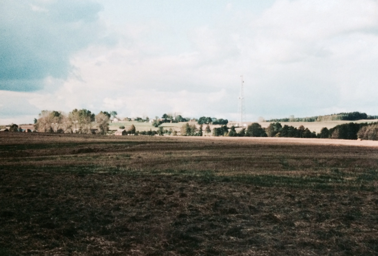 Mittig Dębogóra; links neben Sendemast der Bismarckskopf